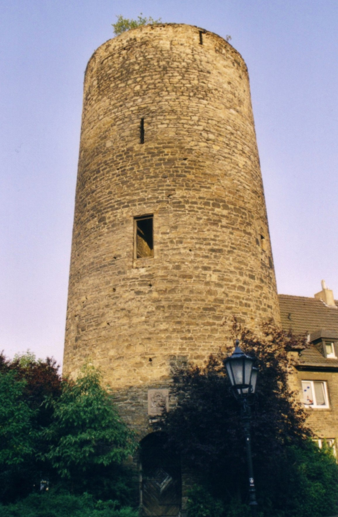 Der alte Turm der Burg Wetter im Jahr 2002.